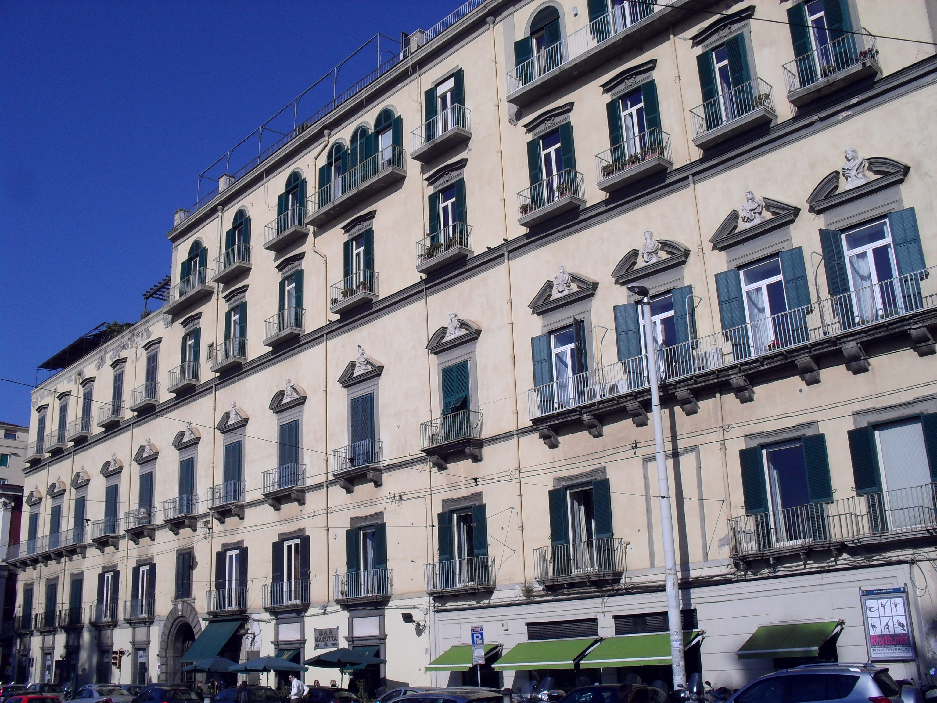 Palazzo Piazza Vittoria (Napoli)